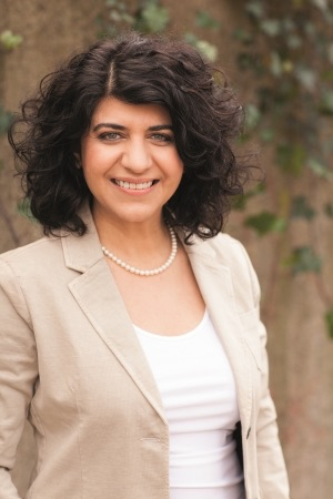 Berivan Aymaz 2016